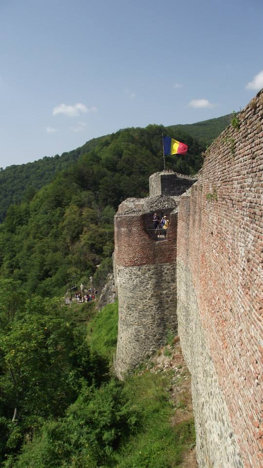 Cetatea lui Vlad Țepeș.